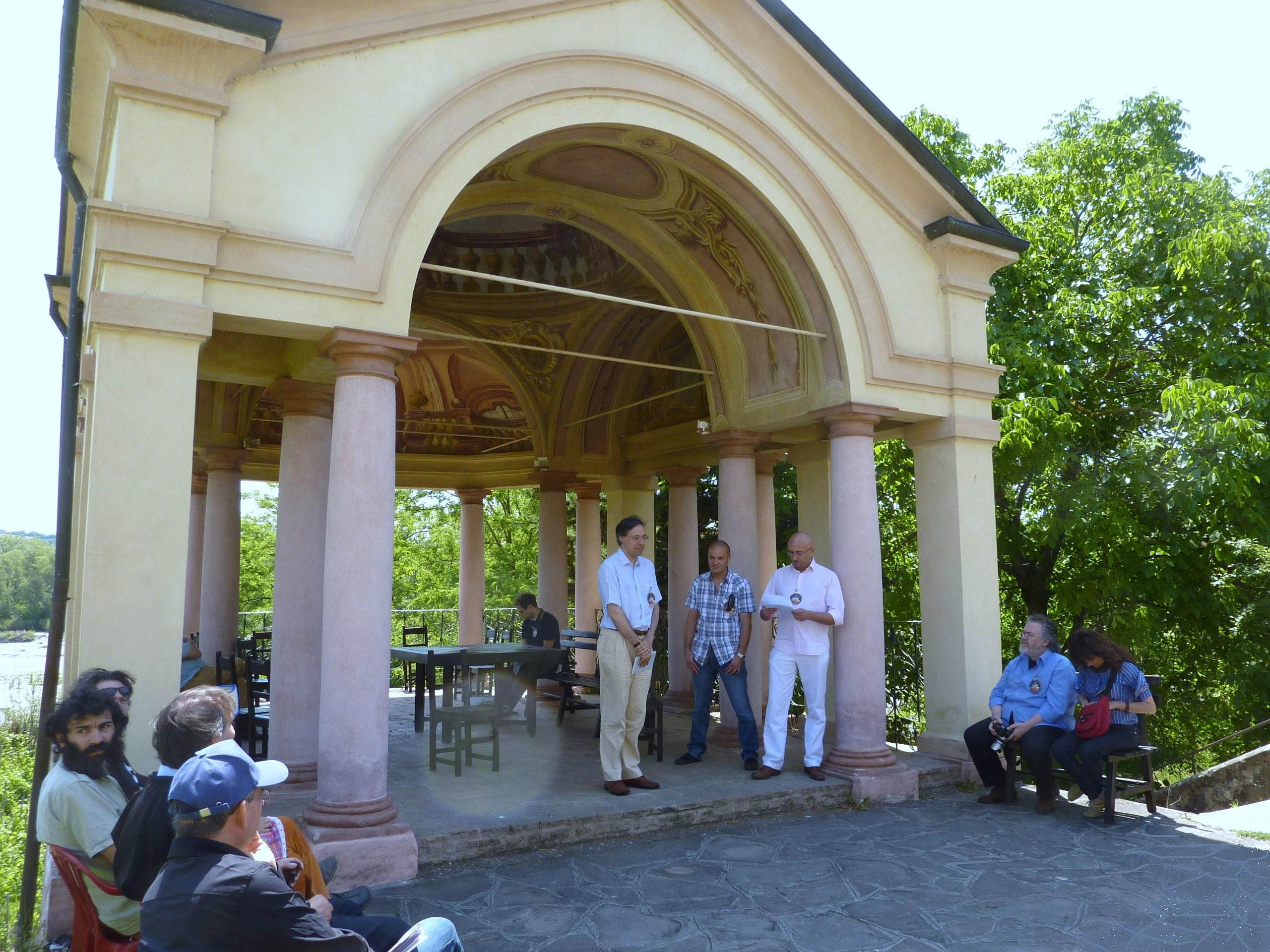 Il Belvedere della Badia di Torrechiara durante una manifestazione culturale in occasione del "Panyl Day" (29 maggio 2011).